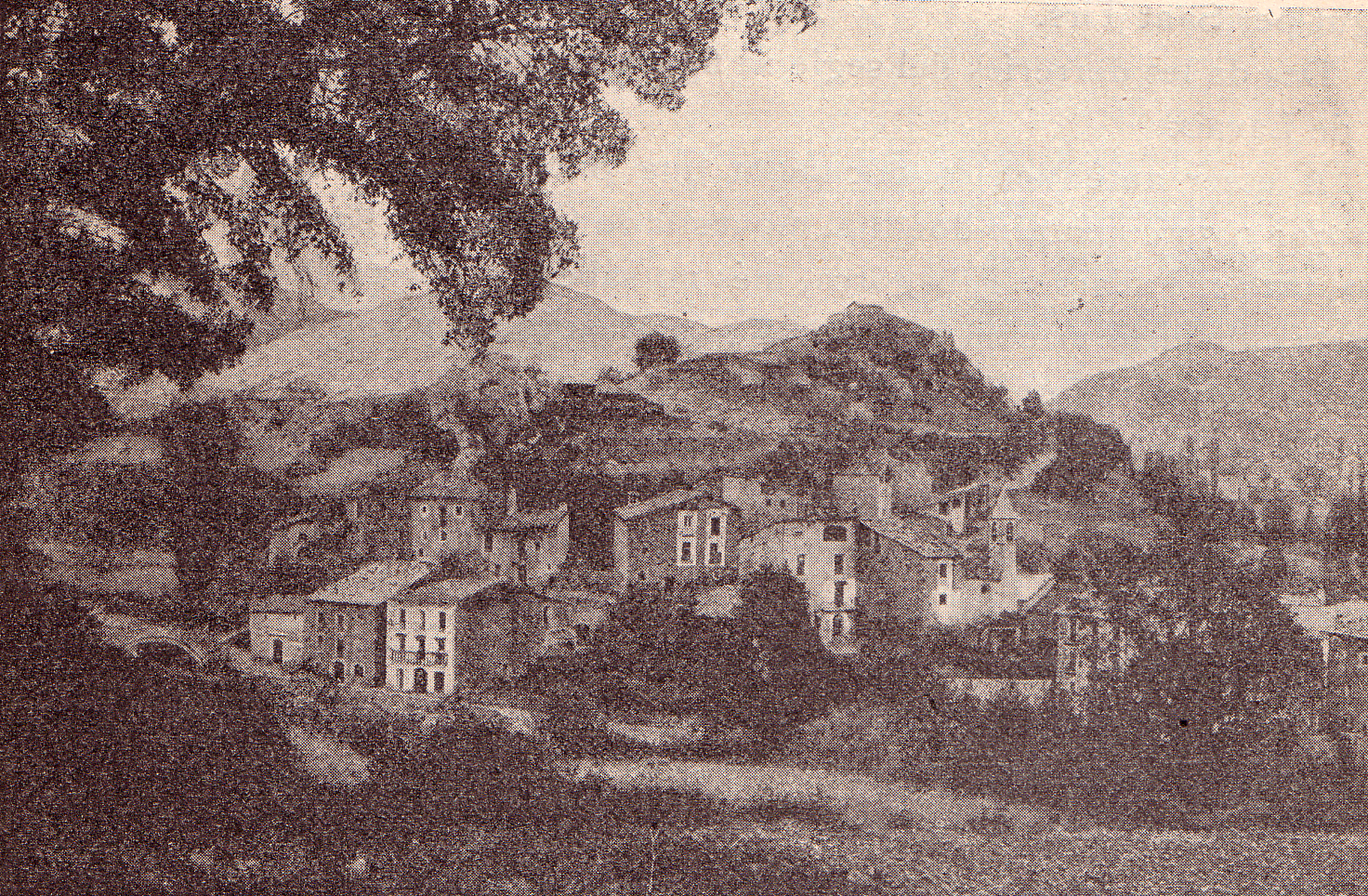 Imatge escanejada per Gustau Erill i Pinyot d'un llibre publicat vers 1915. L'autor de la fotografia fa 87 anys que és mort.